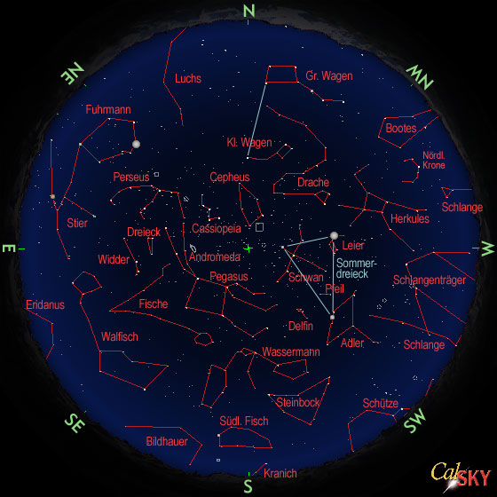 Sternhimmel im Herbst (50° Breite, Mitte Oktober 21 Uhr) Berechnet mit Programm calSKY, siehe z. B. Geof 23:35, 23. Dez 2005 (CET)